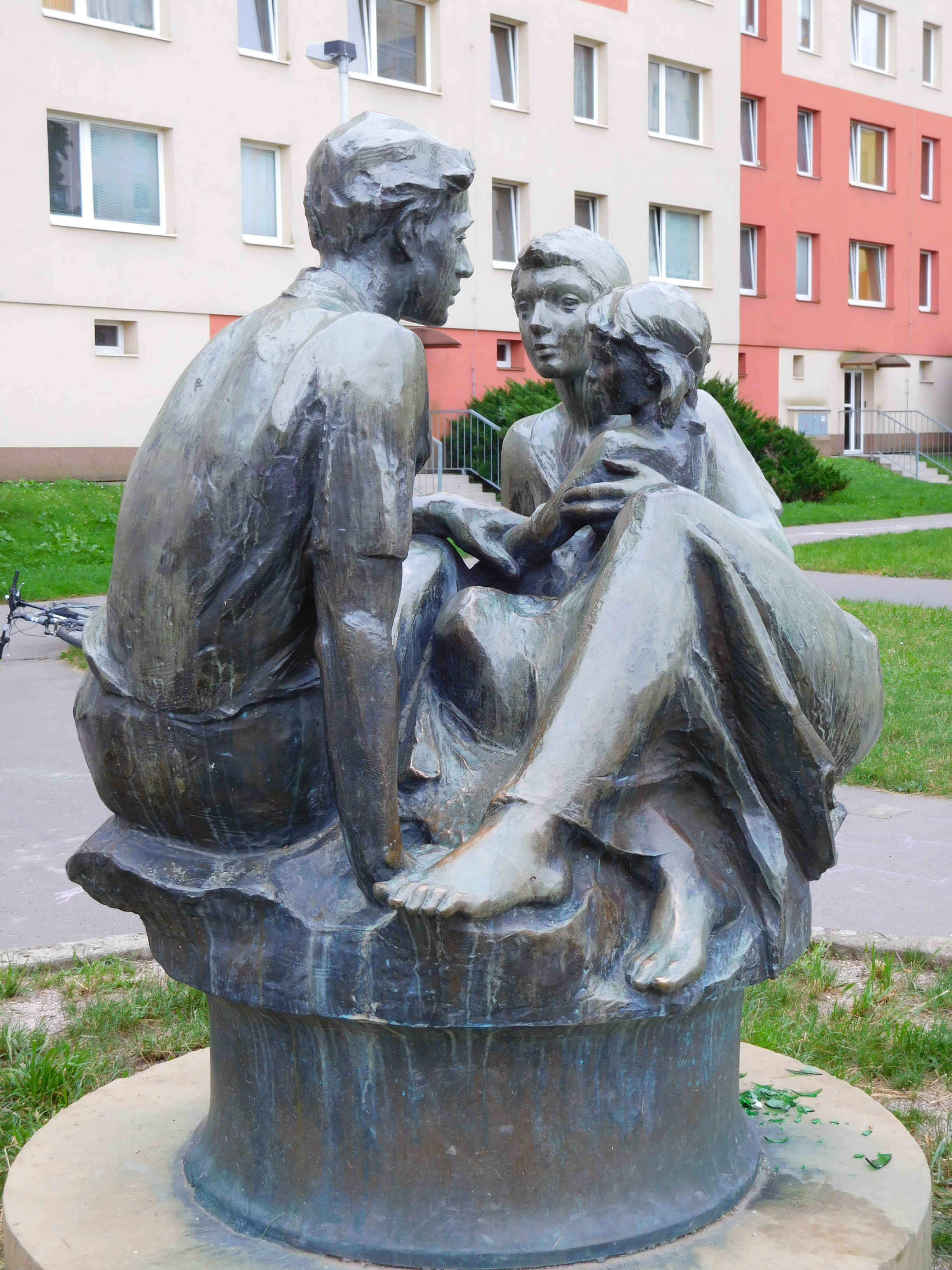 Praha - Hostivař, Libkovská - plastika (Miloslav Šonka: Rodina, 1985)